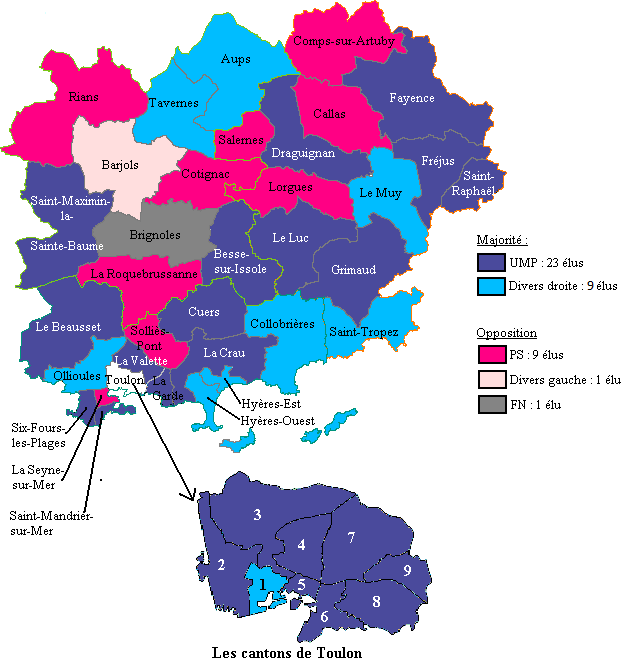 Couleur politique des cantons du Var en Février 2015